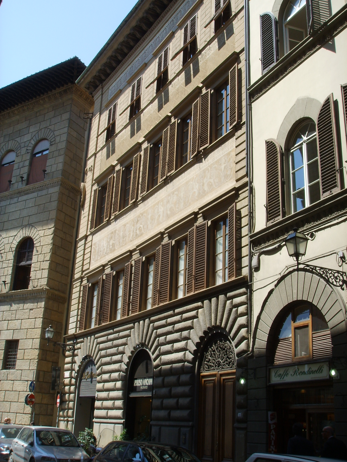 Palazzo adorni braccesi